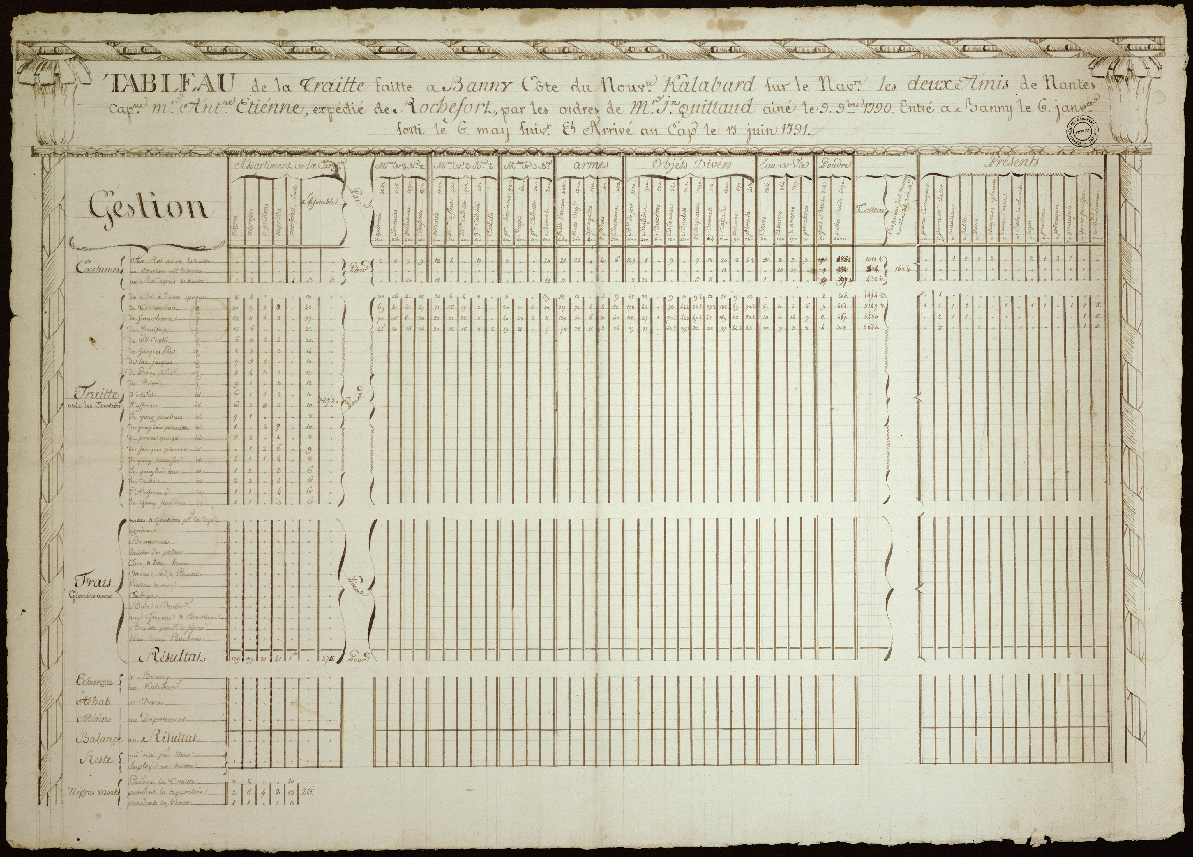 Tableau de vente des captifs à Saint Domingue- Tableau de la vente de 288 têtes de Nègres à la cargaison du navire Le Vistor de La Rochelle, capitaine Nowlau, traités à Gabinde, côte d'Angole, à l'adresse et consignation de Cousineau et Lepage, nég(ocian)ts au Cap Français, qui ont ouvert une vente le 11 avril mil sept quatre-vingt-dix